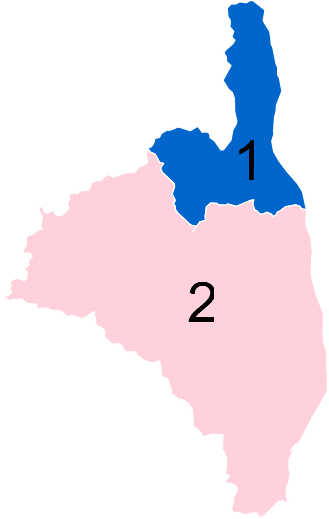 Résultats des élections législatives de la Haute-Corse en 2012